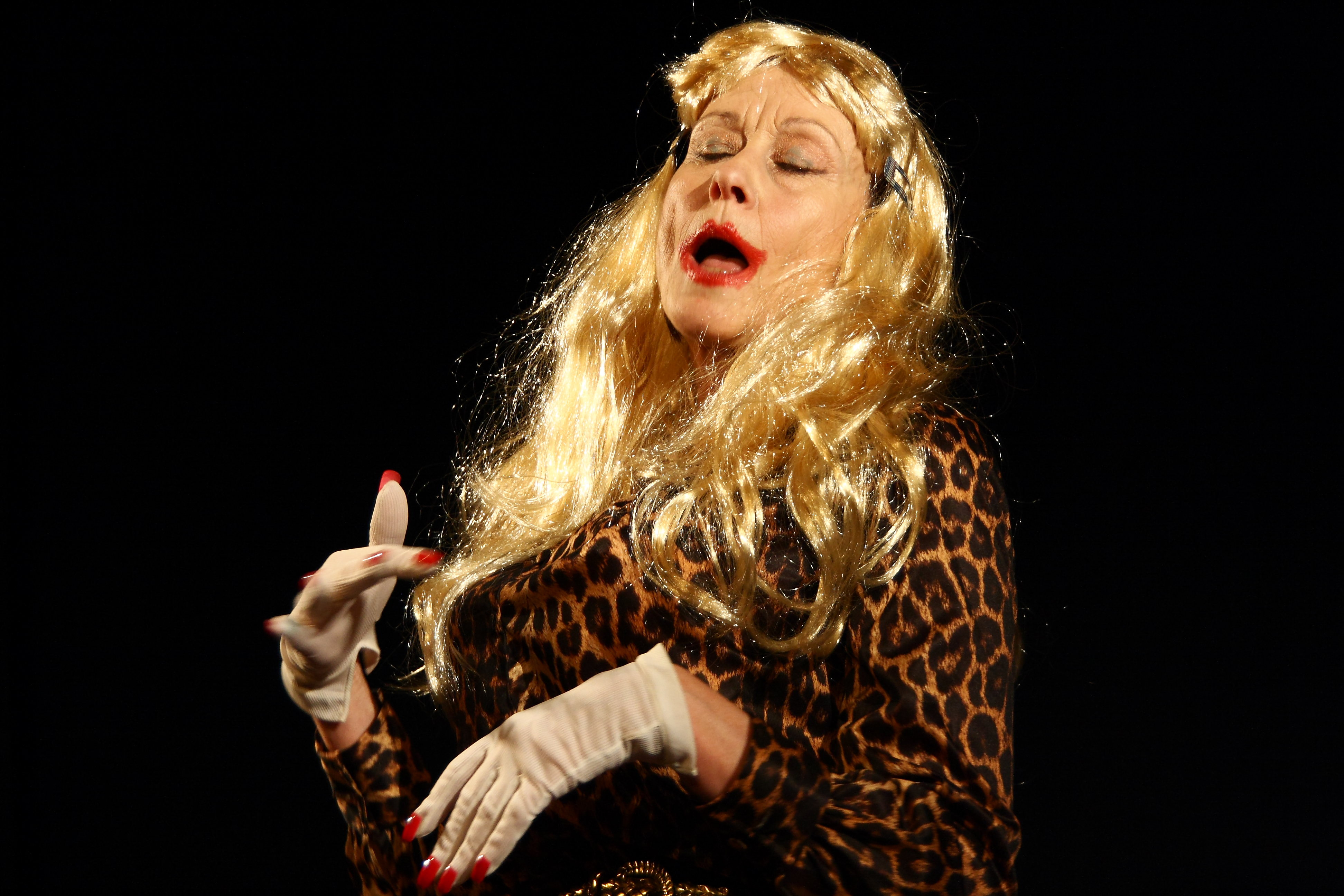 Die Schwabenoffensive mit ihrem Programm zum 25-jährigen Jubiläum Komm Du bloß hoim! Reloaded im Kult, Niederstetten.